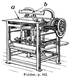 Folder Machine